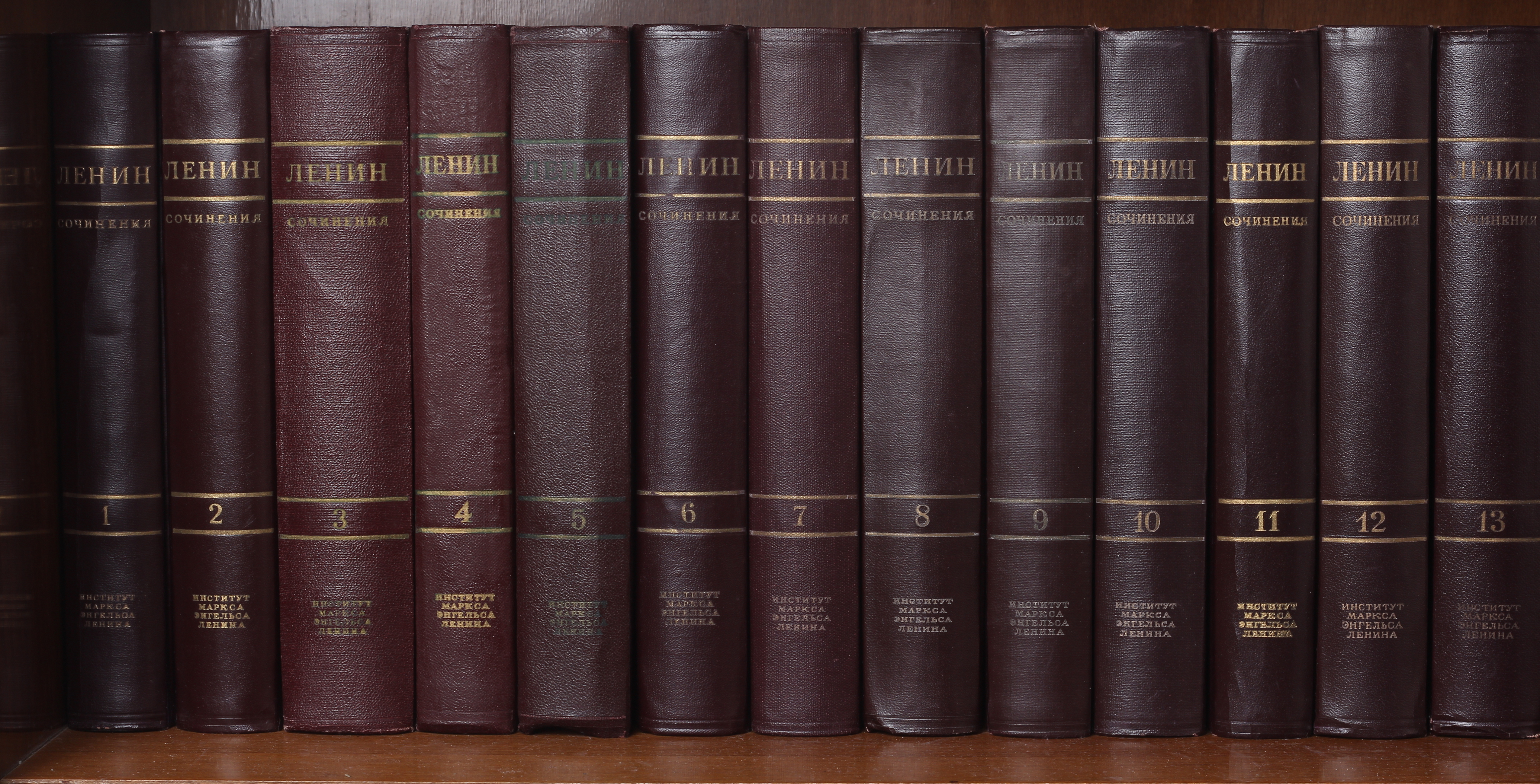 Четвертое издание собраний сочинений В.И.Ленина на полке.